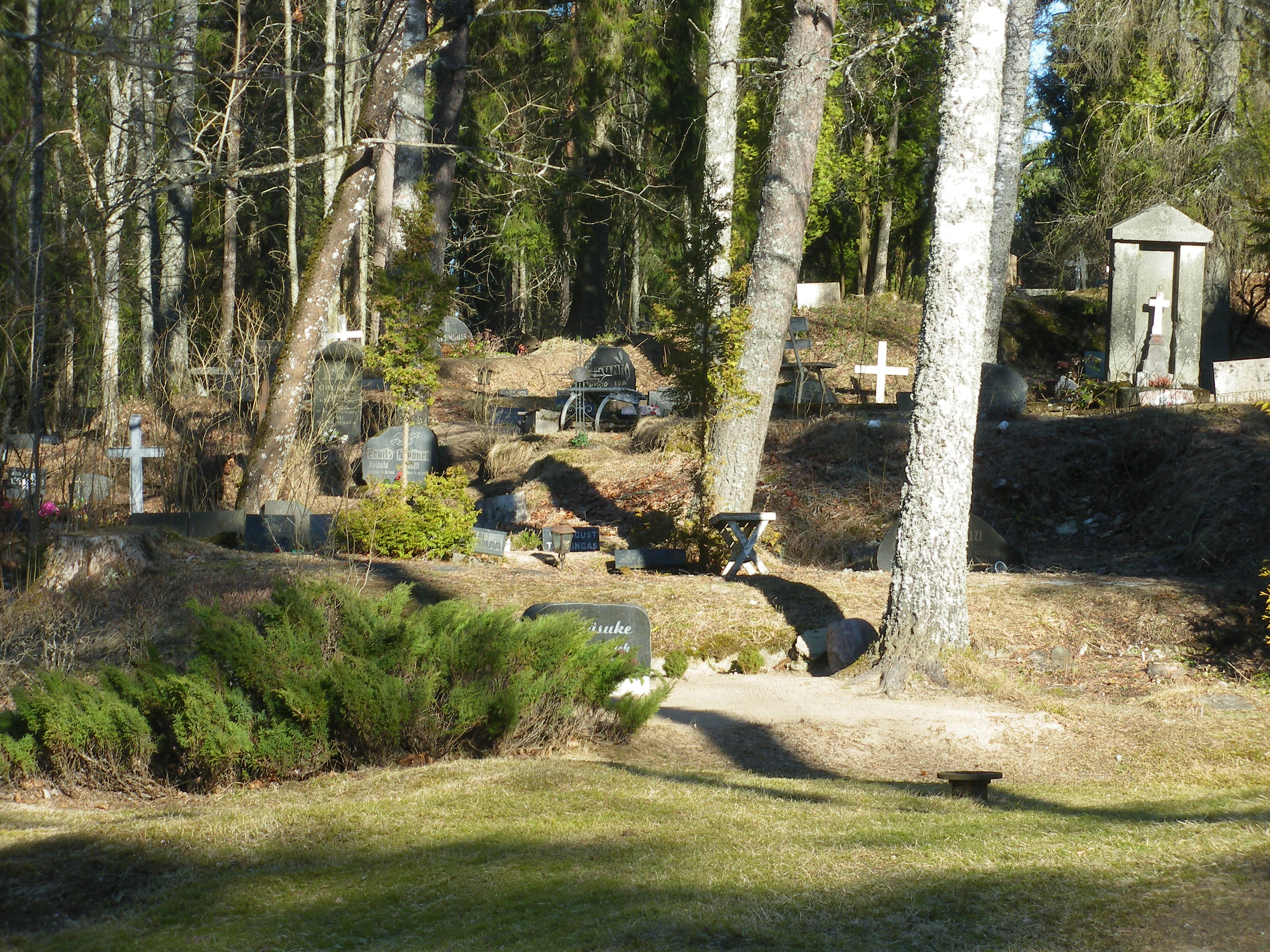 Ajaloomälestis Aegviidu vana kalmistu